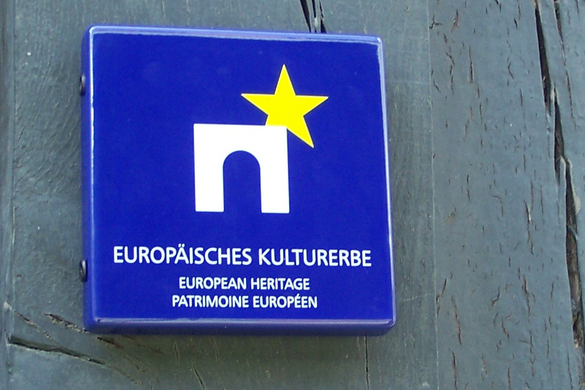 Mit dem Europäischen Kulturerbesiegel werden in Deutschland u.a. Stätten der Reformation ausgewiesen. Das Lutherhaus in Eisenach wurde im September 2011 mit dem Siegel markiert.